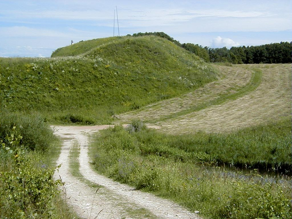 Daugmales pilskalns 1999-07-16